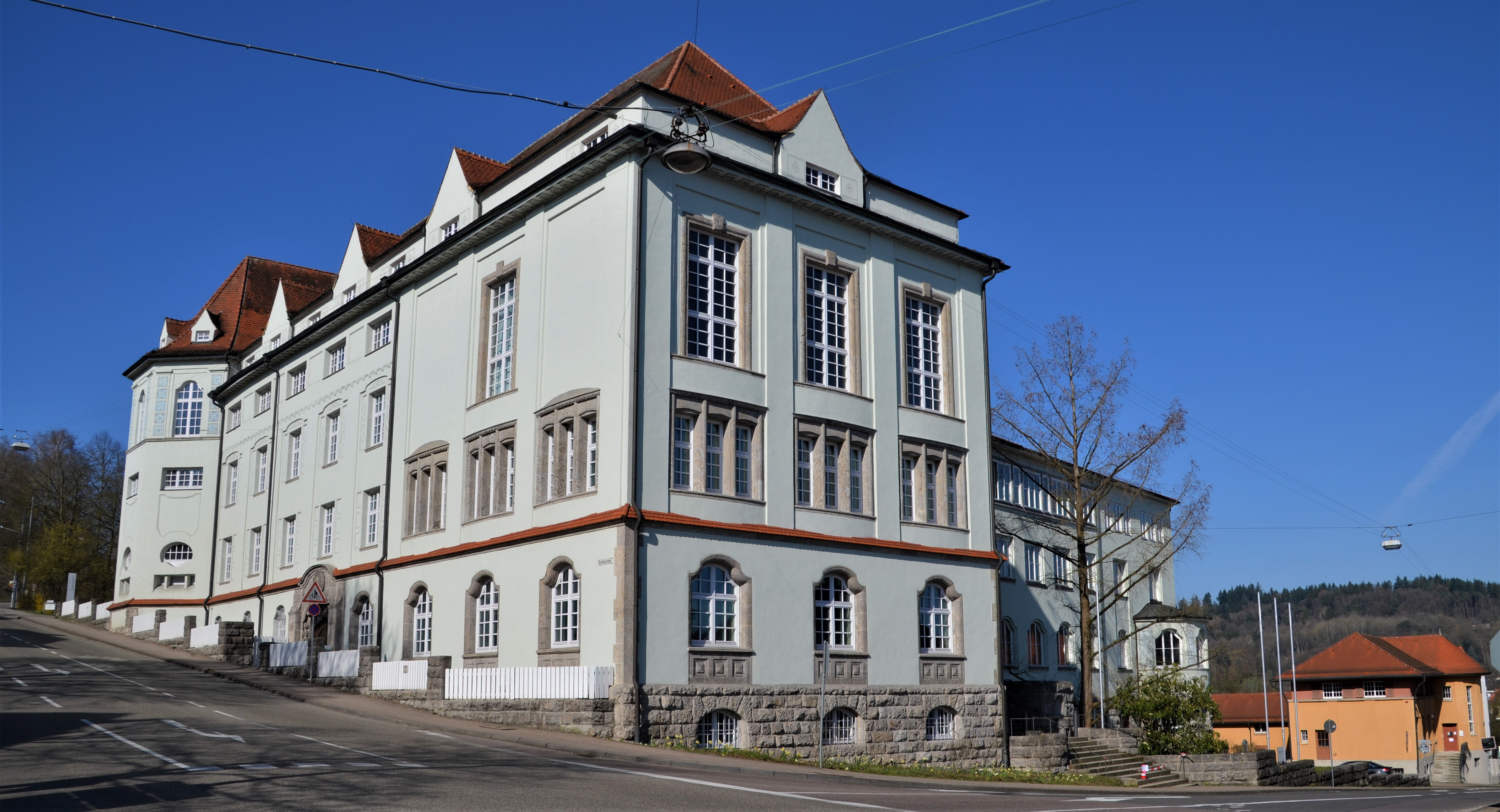 Der Elseasserbau der HfG Gmünd von Südosten